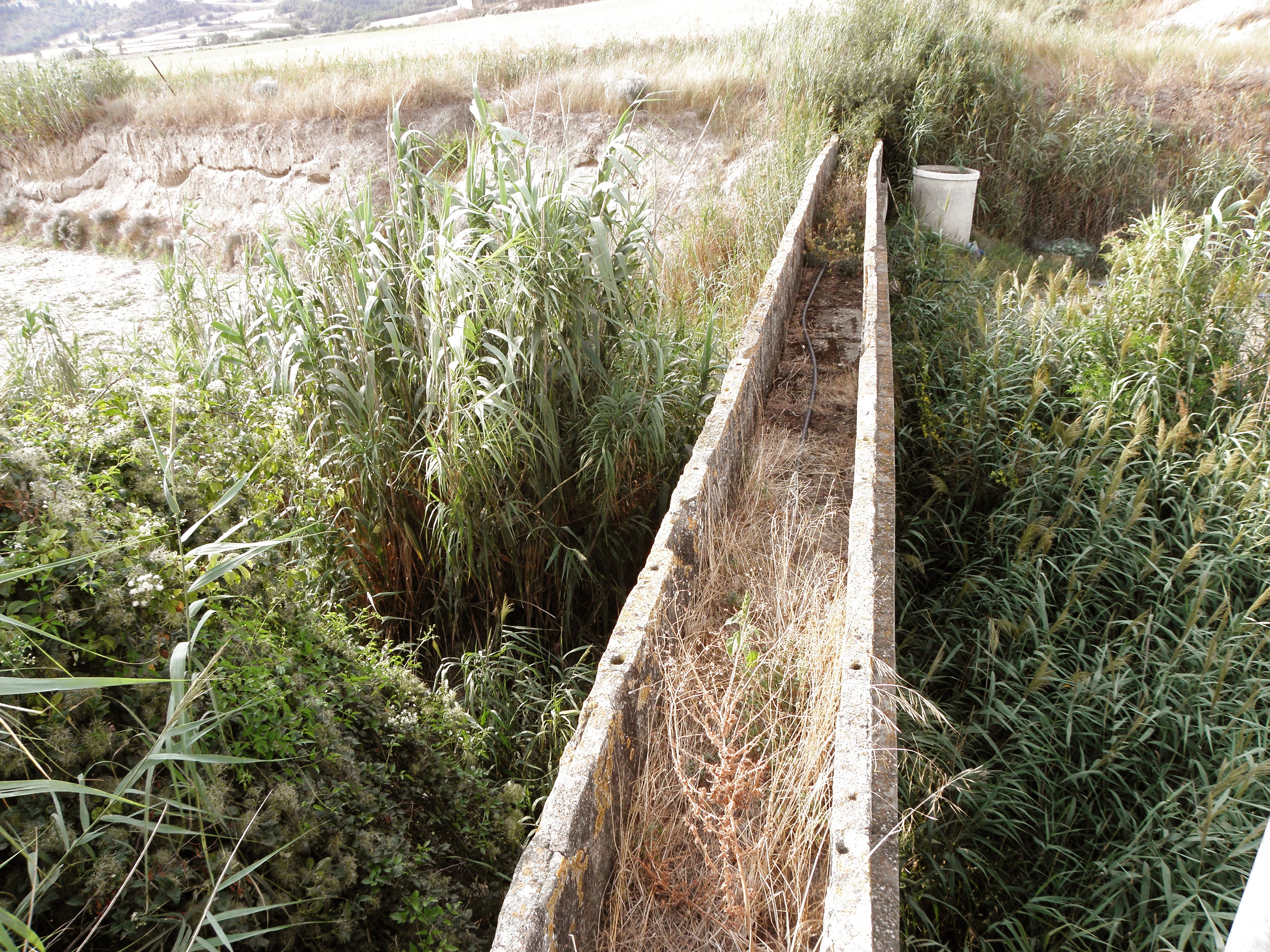 Enfesta (La Molsosa, Solsonès). El pontet (aqüeducte?) a l'entrada del poble.